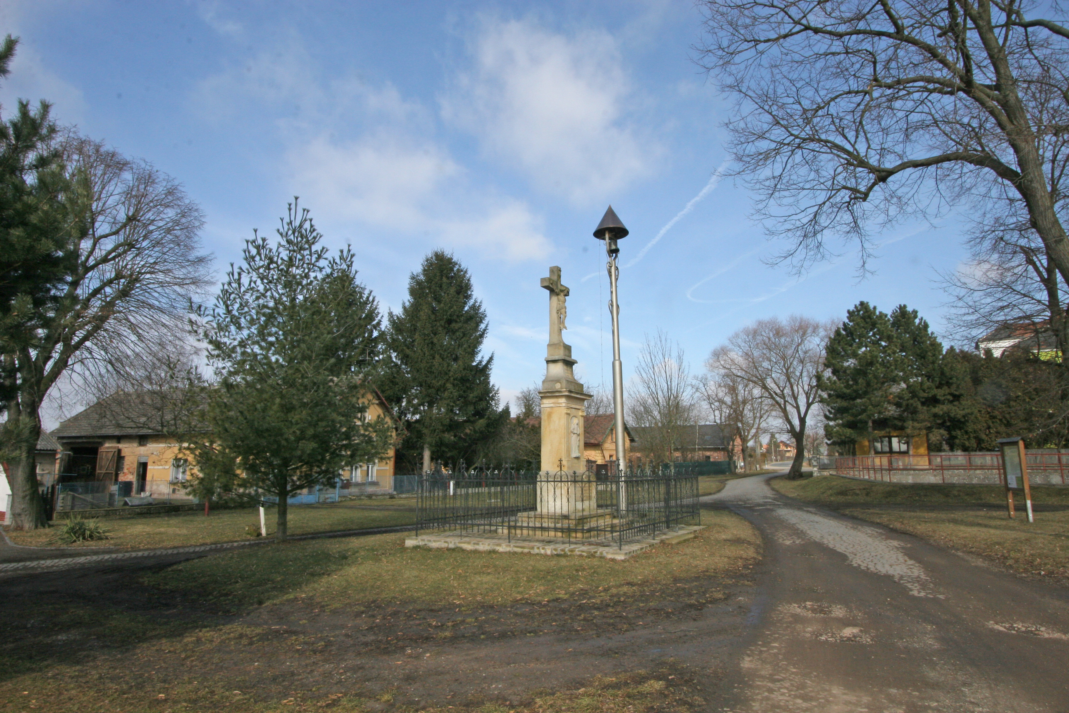 Sedlice zvonička